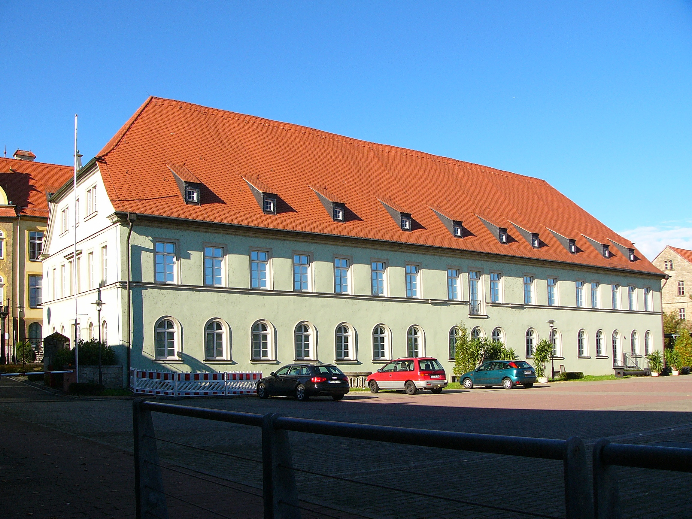 Städtisches Museum; zweigeschossiger gestreckter Halbwalmdachbau, frühes 19. Jahrhundert, im Kern 16. Jahrhundert.This is a photograph of an architectural monument.